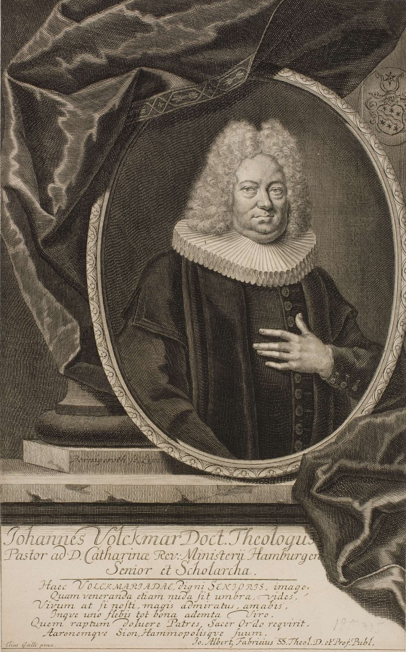 Elias Galli Maler und Martin Bernigeroth, Stecher: Kupferstich 304 x 190 mm (Blatt) Wolfenbüttel, Herzog August Bibliothek, Inventar-Nr. A 22987